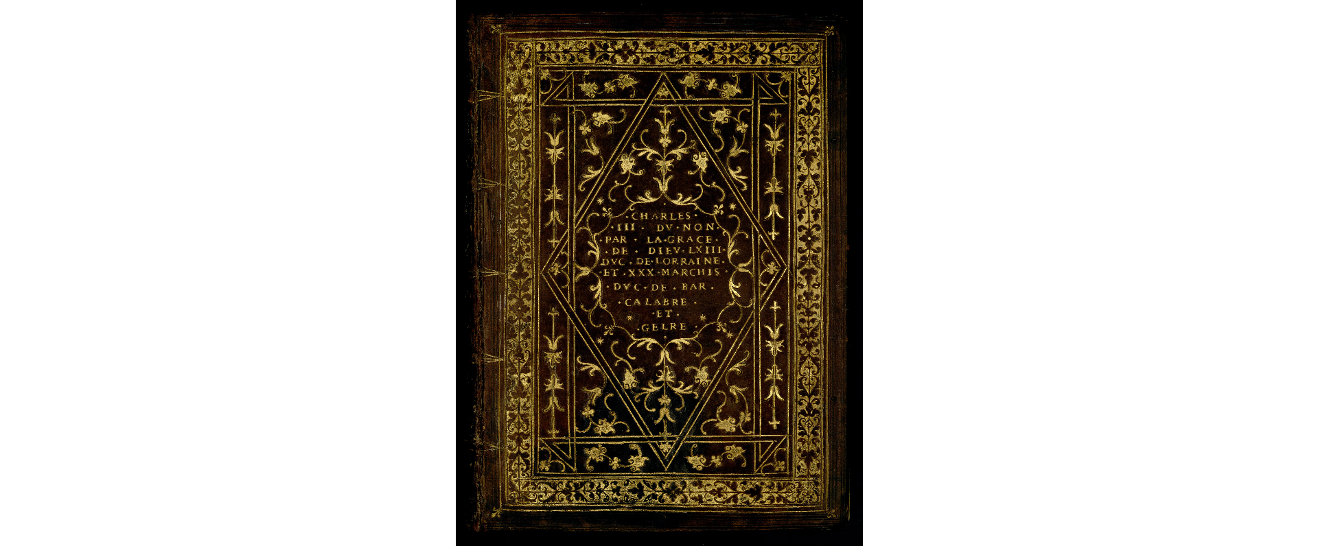 Epitomé de la geste des 63 ducs de Lorraine..., par Jean d'Aucy (1556). Plat supérieur de la reliure